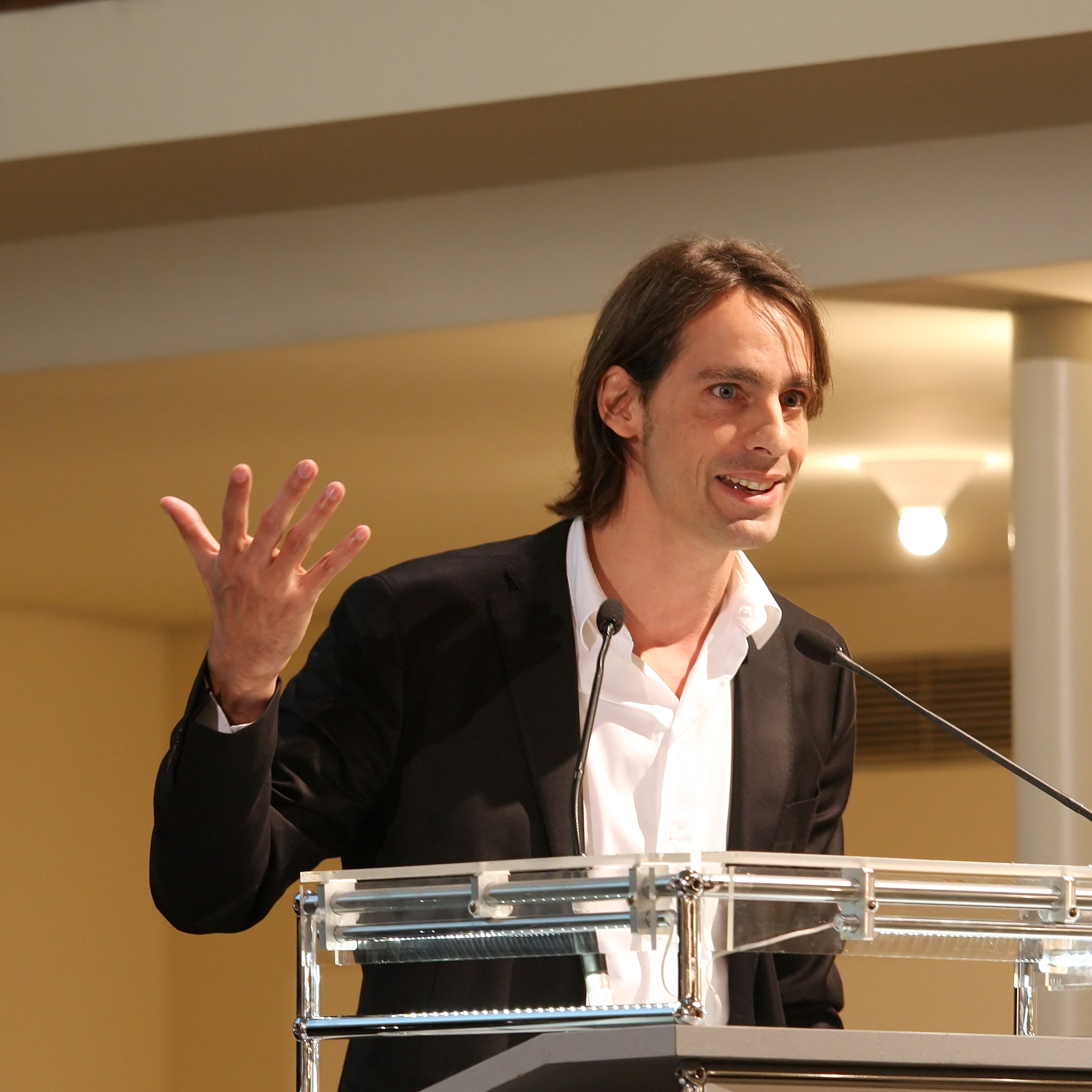 Richard David Precht auf der Veranstaltung „Aus der Geschichte lernen - Die Kölner Friedensverpflichtung leben“ im Gürzenich im Rahmen von „Köln stellt sich quer“.